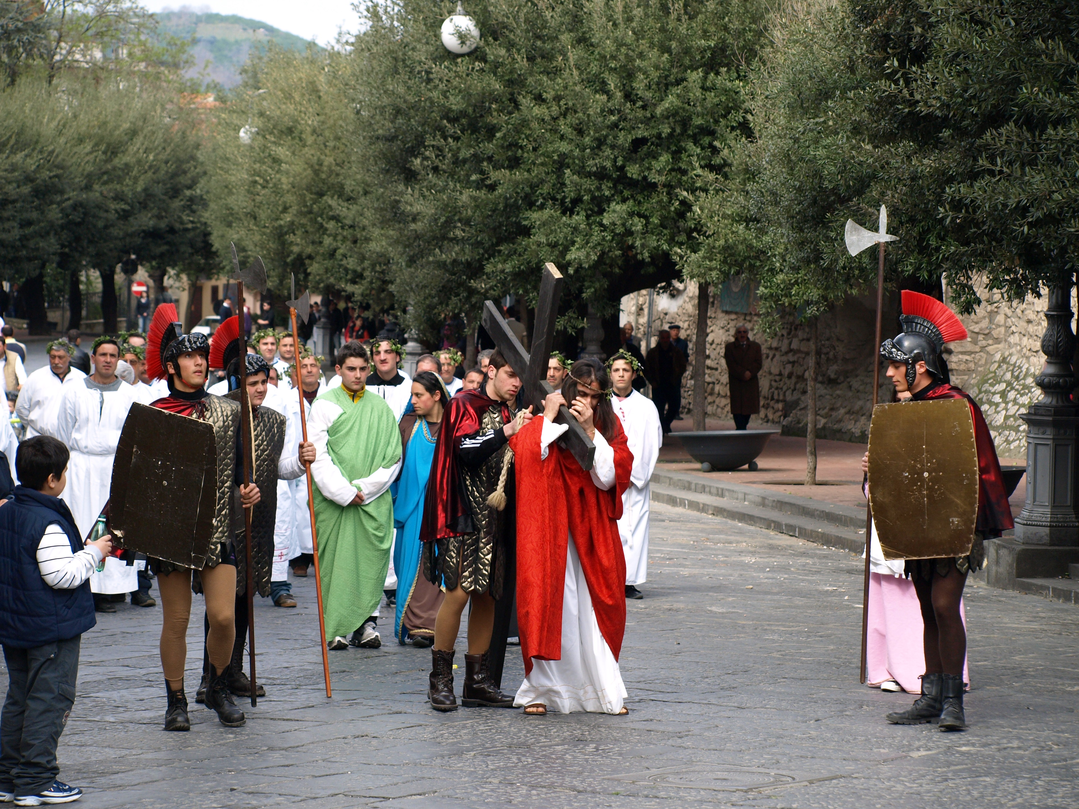 Venerdì Santo Processione Lauro 2009